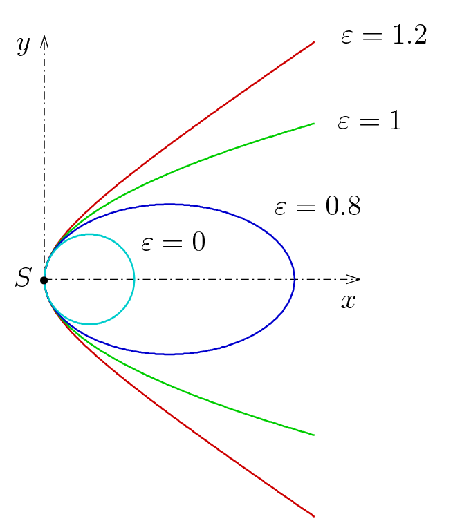 Kegelschnitt-Schar